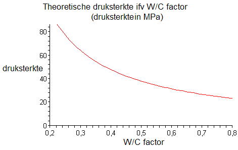 Druksterkte beton ifv WC-factor: schematisch